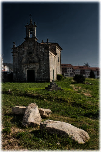 pazo de san marco en galicia